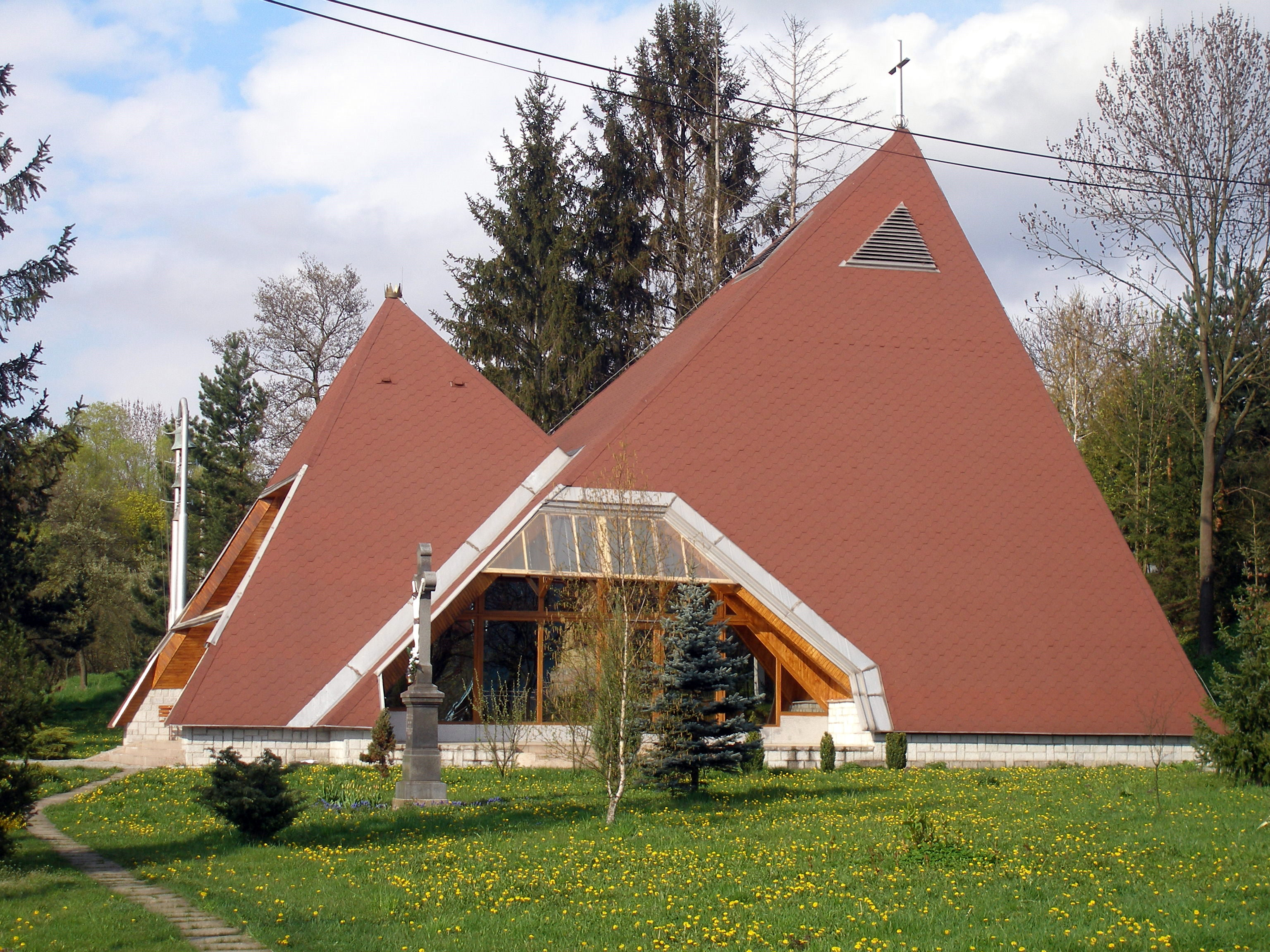 Obec Mirkovce okres Prešov región Šariš